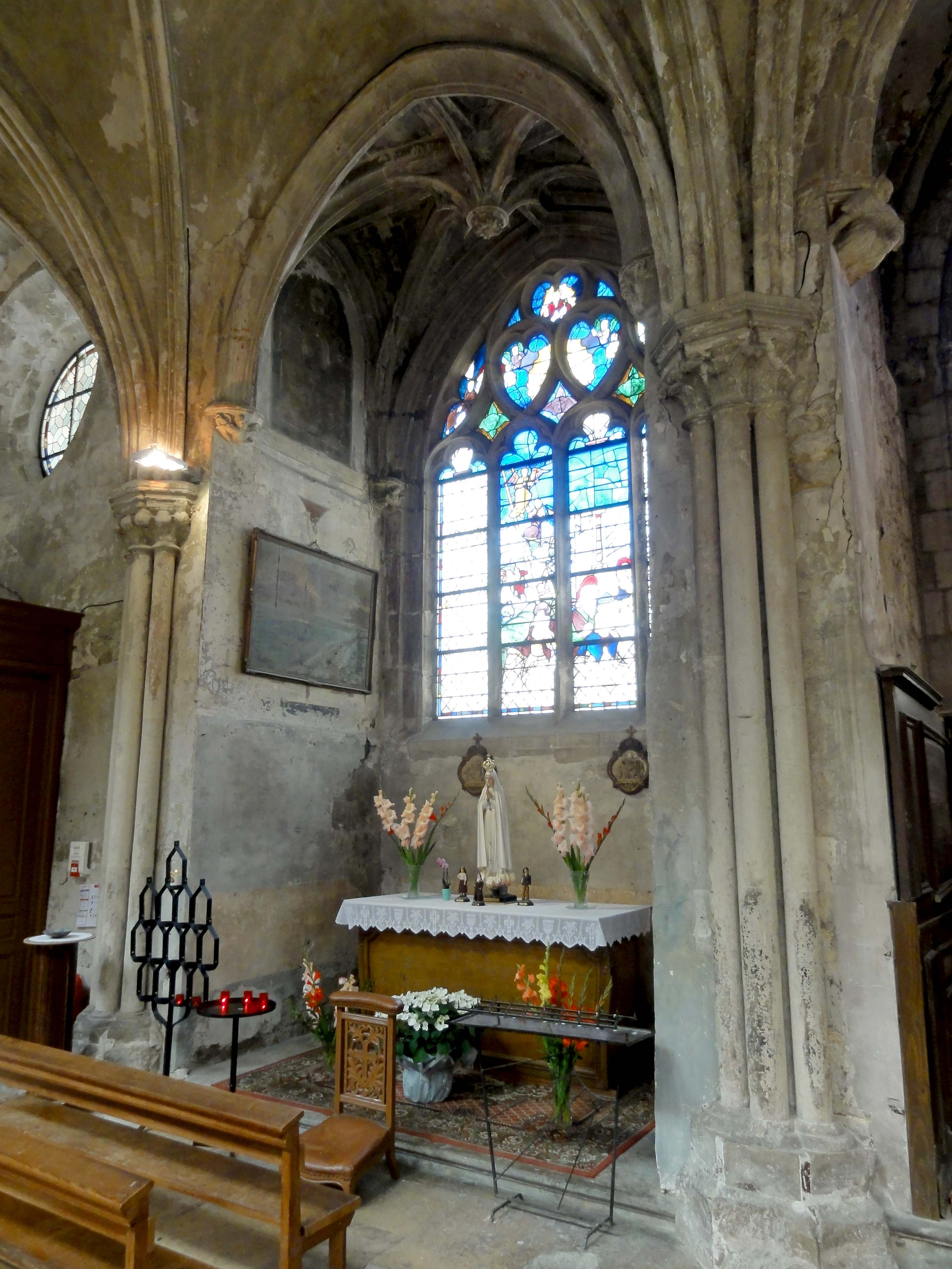 Voir titre.